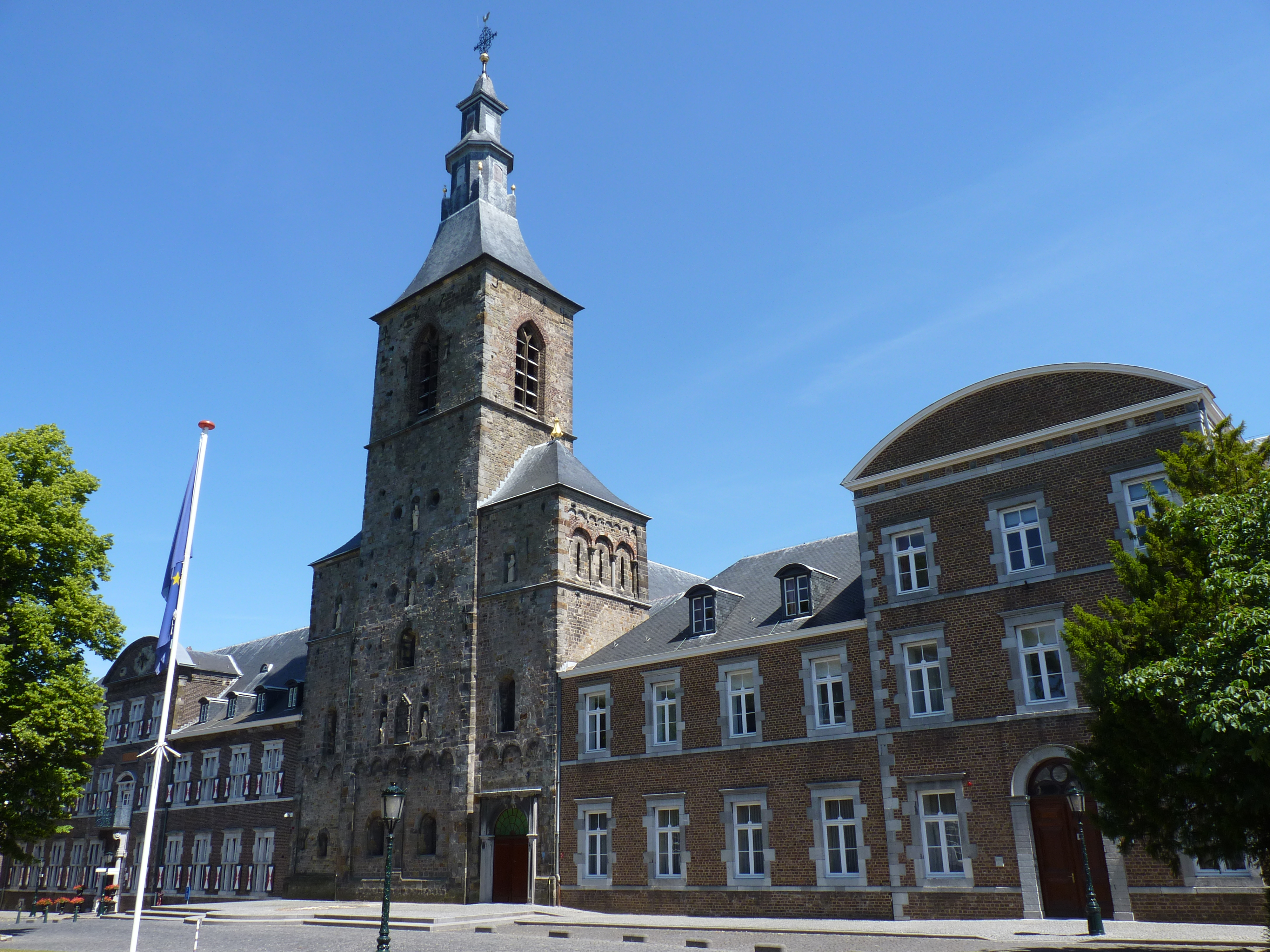 Kerkrade Abdijkerk Rolduc